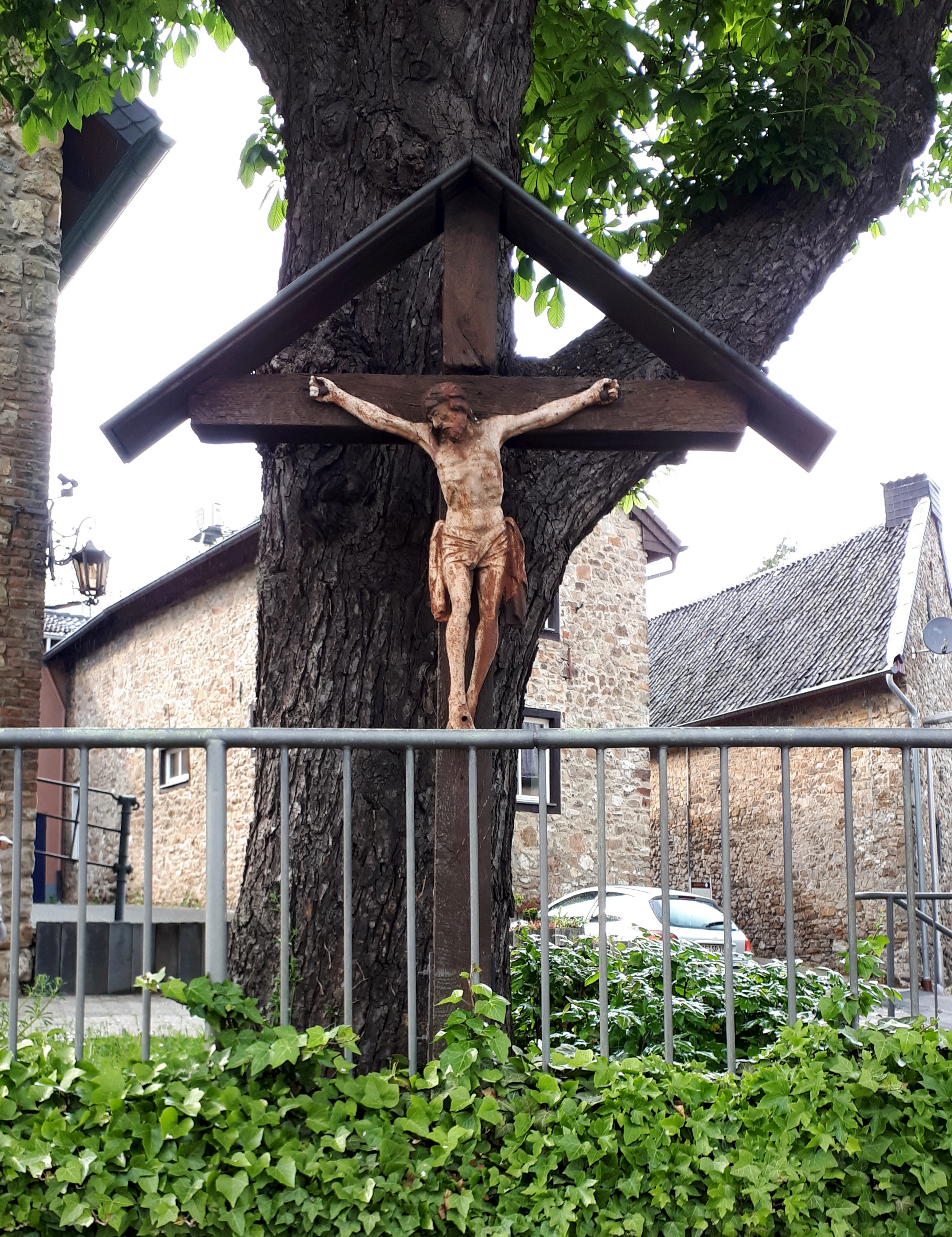 Wegekreuz in der von Coels-Straße (Nr. 281), Nähe Heckstraße in Aachen-Eilendorf; gestiftet 1829 von den Besitzern der dahinter liegenden Gaststätte Kind